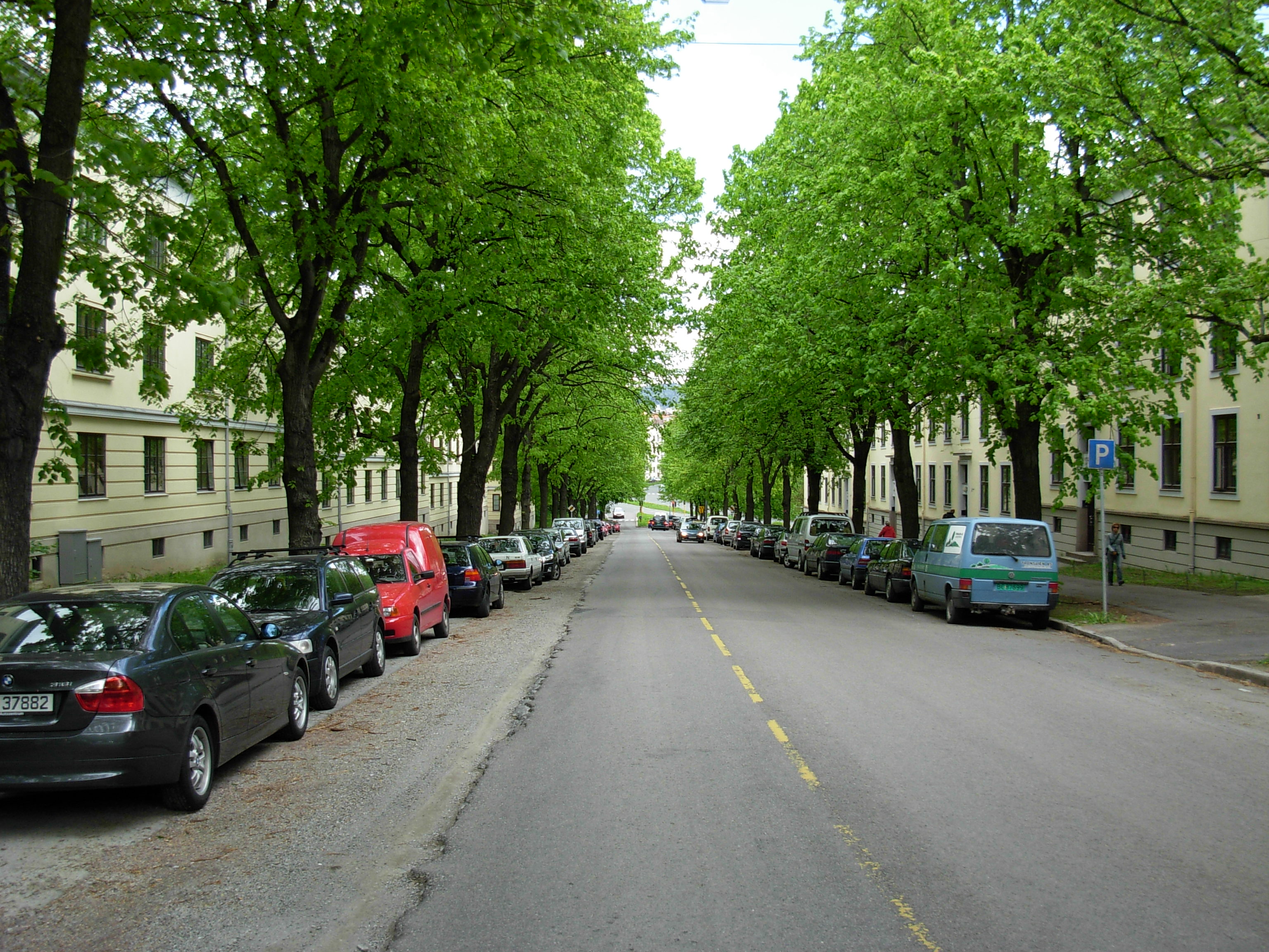 Colletts gate, Oslo